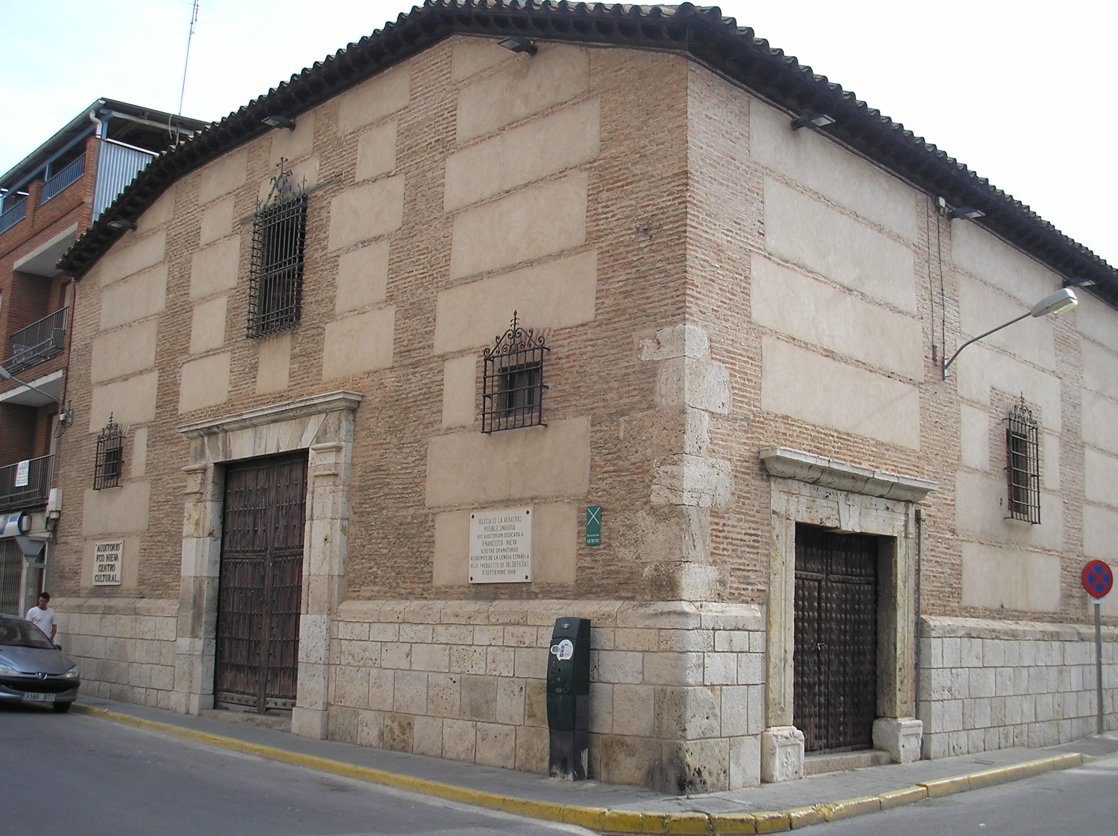 Valdepeñas. Auditorio Fco. Nieva. Antigua Sinagoga